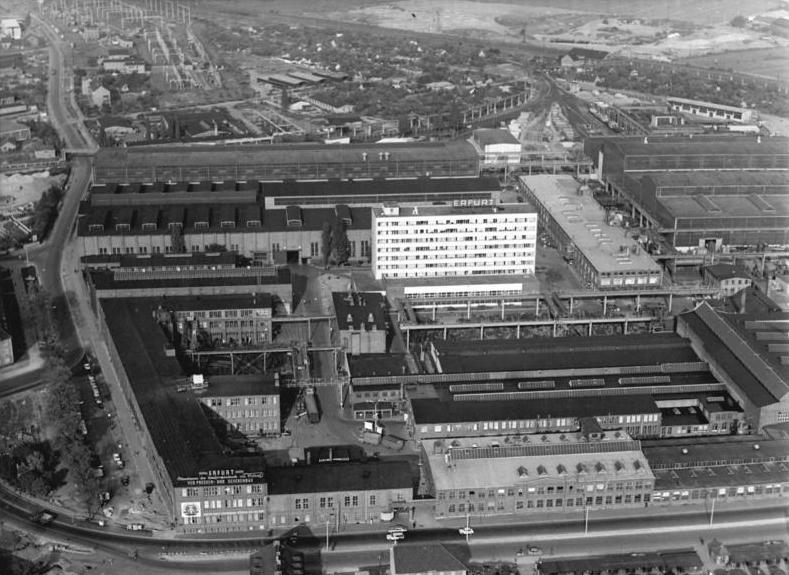 Erfurt, VEB Kombinat Umformtechnik, Werksgelände ADN-ZB Demme 2.12.71-kut-Erfurt: Ein bedeutender Industriebetrieb spanloser Umformtechnik der DDR aus der Luft gesehen-VEB Kombinat Umformtechnik Erfurt, Stammbetrieb Erfurt. In diesem Werk werden Maschinen zur Umformtechnik hergestellt, die hochproduktive Verfahren der spanlosen Fertigung insbesondere für die Blechverarbeitung, im Automobil- und Fahrzeugbau und in der Konumgüterindurstrie, ermöglichen. Die Erzeugnisse werden in ca. 50 Länder, darunter alle RGW-Länder, exportiert. Hauptabnehmer ist die Sowjetunion. Die gesamt 10000 Werktätigen aller Betriebe des Kombinats sehen in der Erfüllung des Jahres- und Exportplanes einen wesentlichen Beitrag bei der Verwirklichung ihres Wettbewerbprogramms. ZLB-L 0798-71